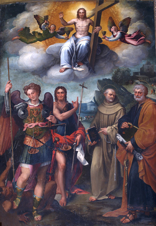 Cristo redentor con San Miguel arcángel, San Juan Bautista, San Pedro y San Bernardinolabel QS:Les,"Cristo redentor con San Miguel arcángel, San Juan Bautista, San Pedro y San Bernardino"